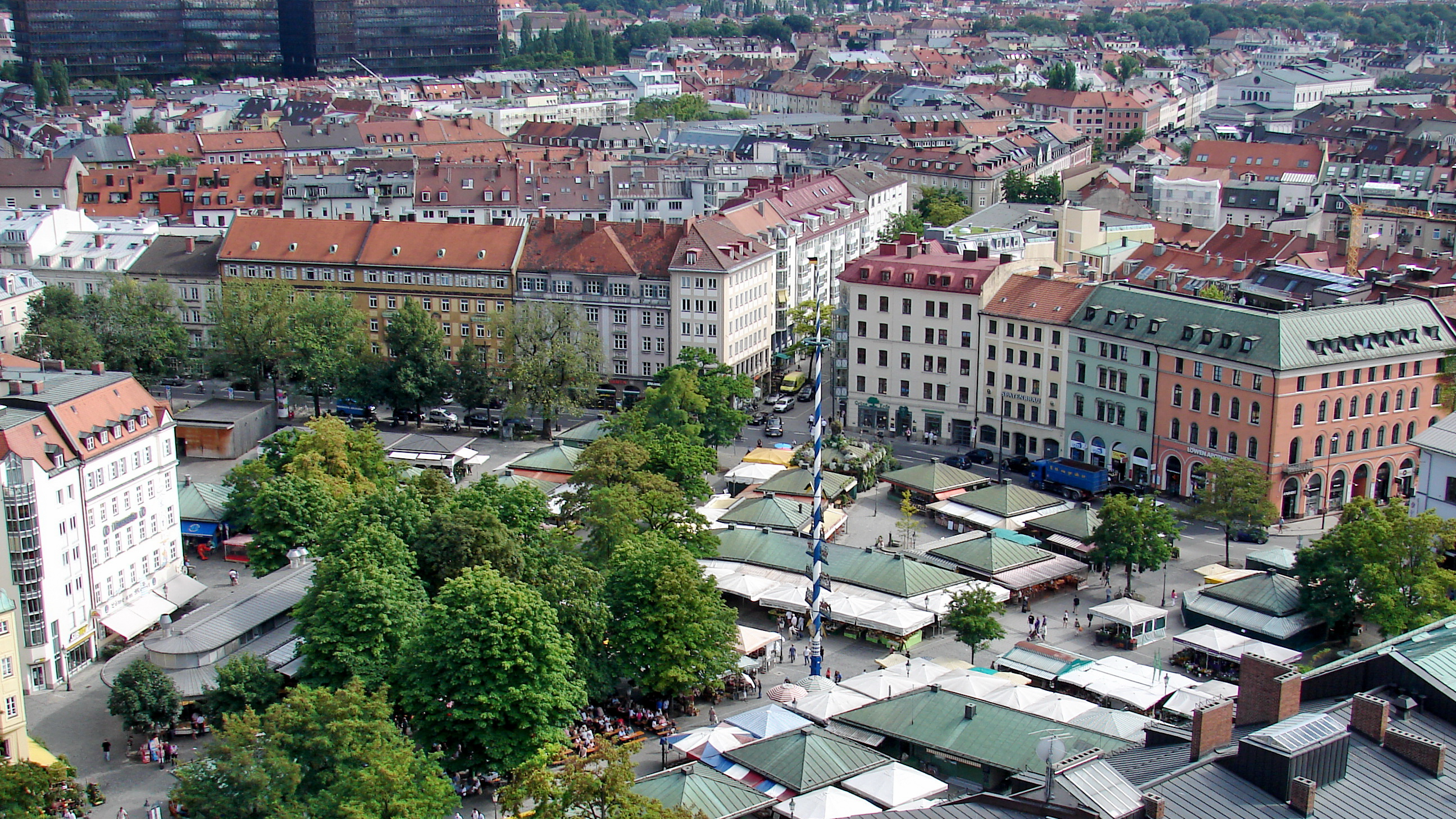 Der Viktualienmarkt ist ein ständiger Markt für Lebensmittel (veraltet auch Viktualien) in der Altstadt von München. Er findet täglich, außer an Sonn- und Feiertagen, statt und besteht größtenteils aus festen Ständen.